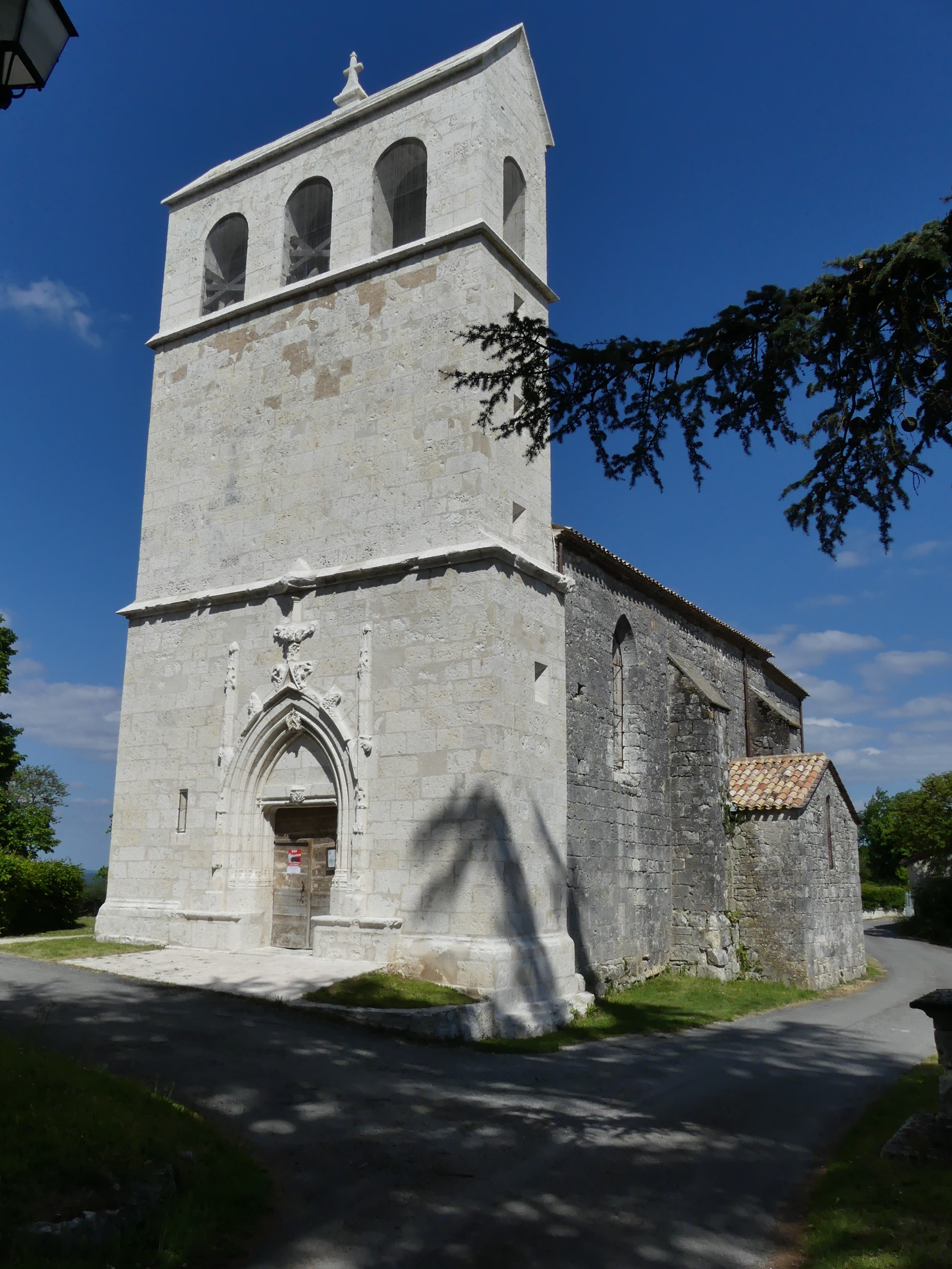 L'église de Colombier, Dordogne, France.